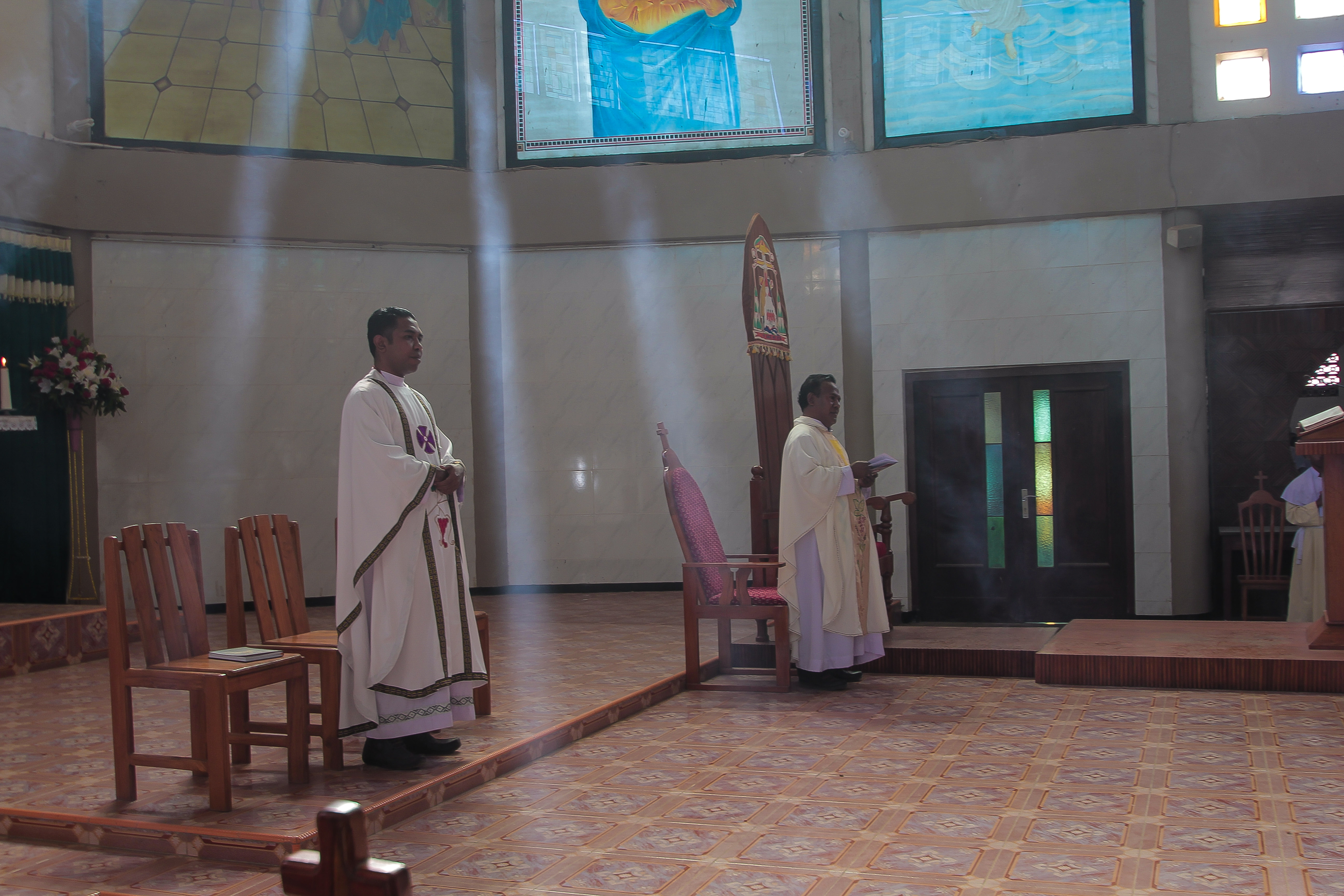 Misa di keuskupan Timor, Kabupaten Belu